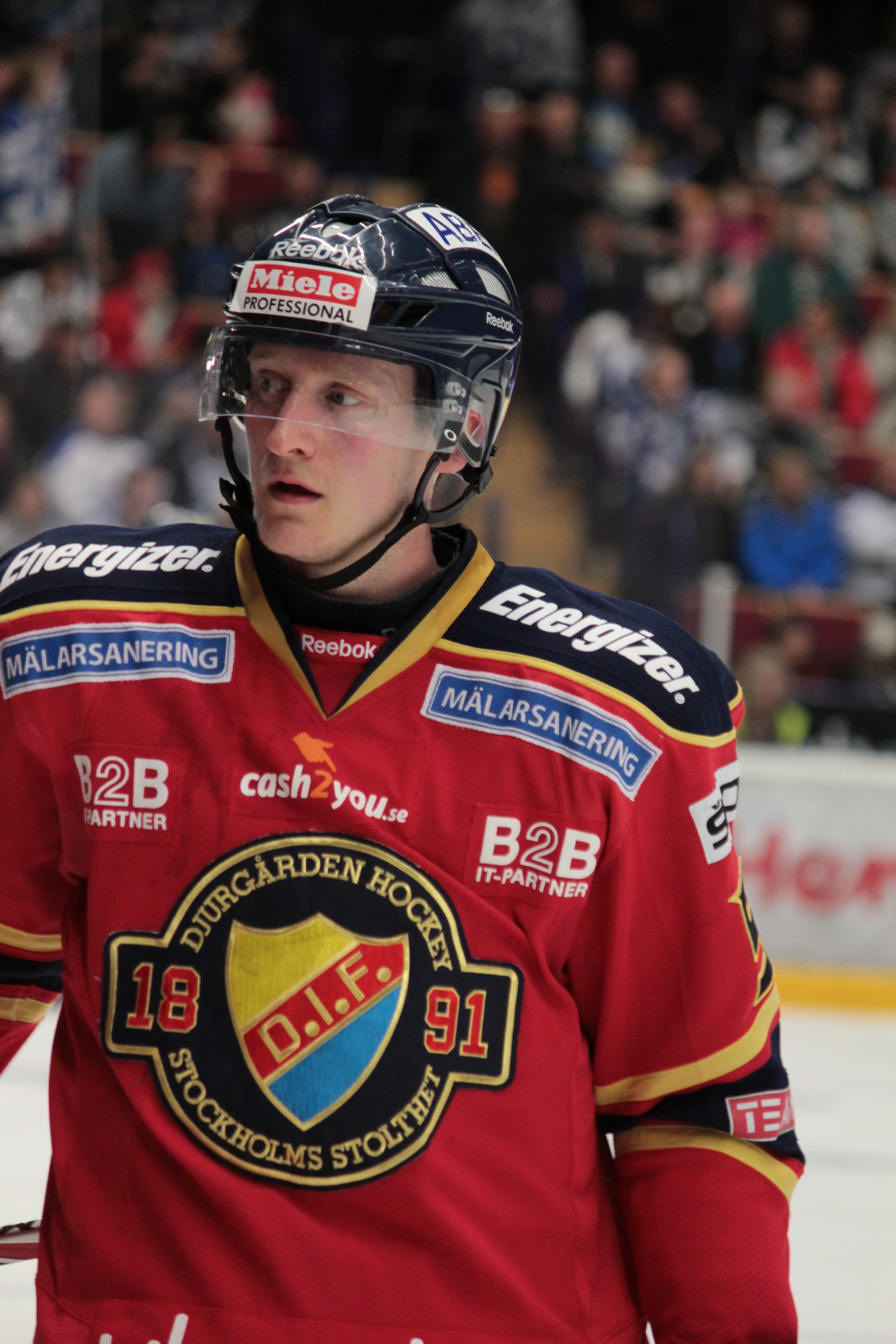 David Printz i kvalmatchen mellan Leksands IF och Djurgårdens IF i Leksand 2012-03-31